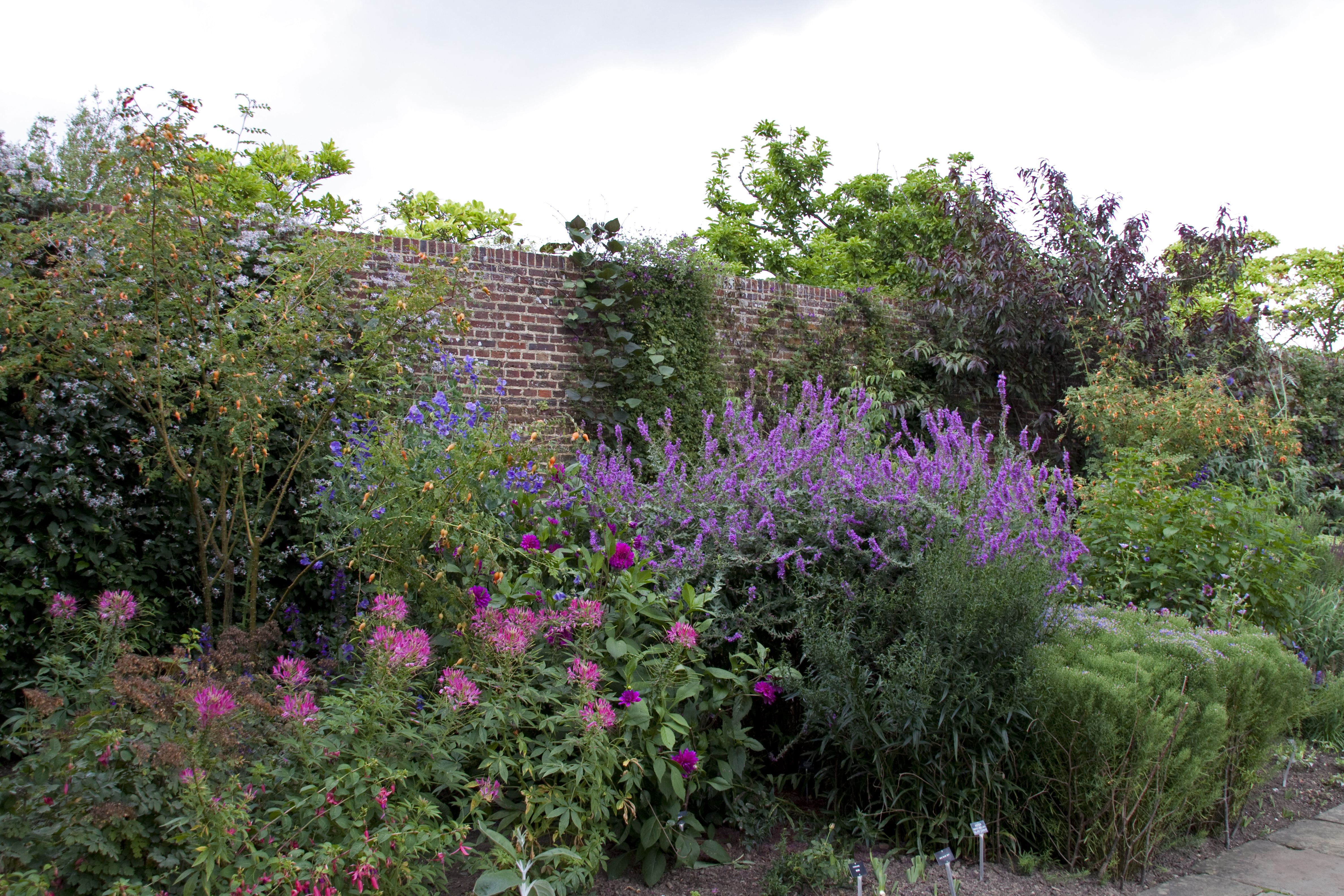 Sissinghurst Gardens 9